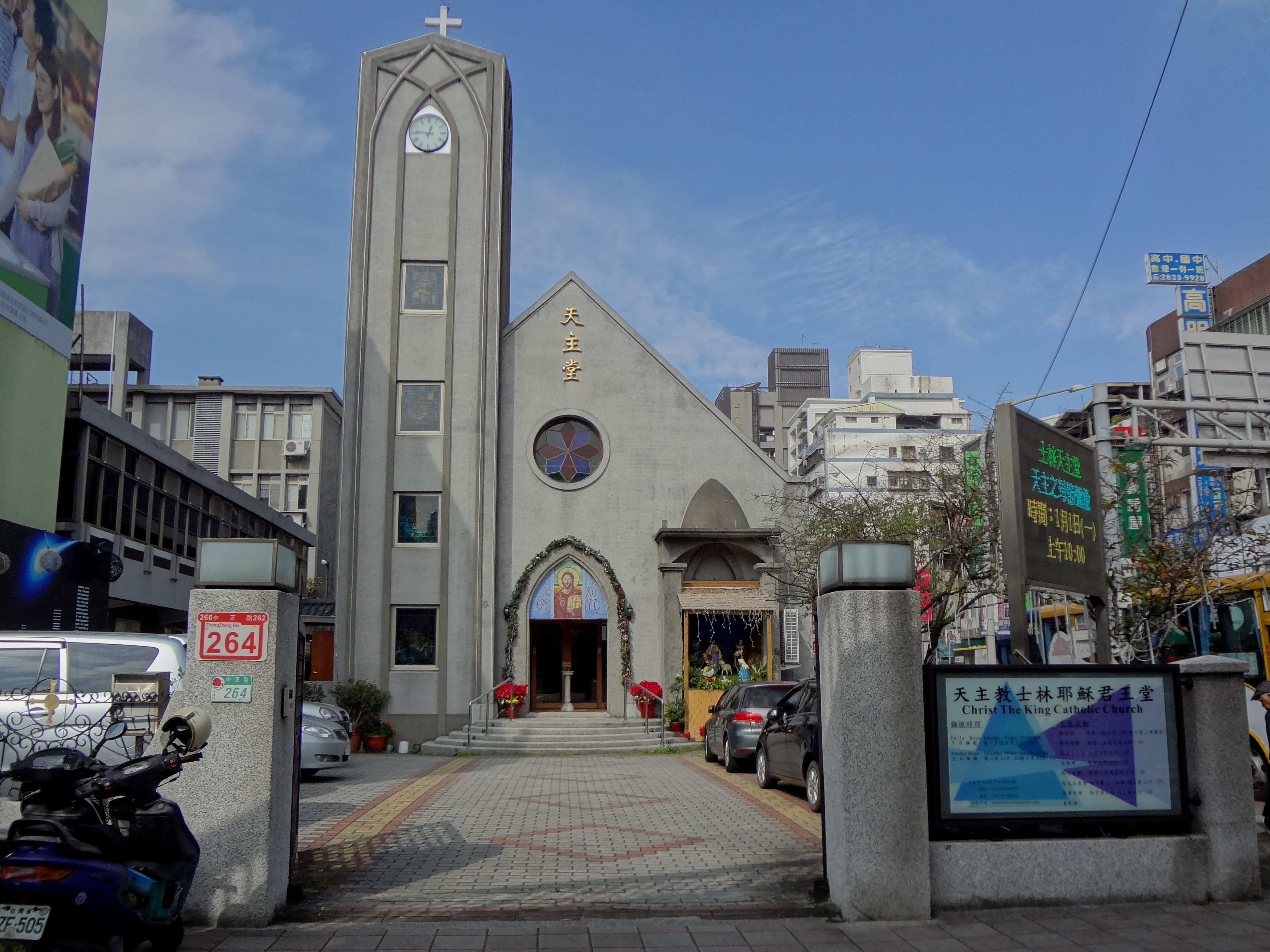 天主教台北總教區士林耶穌君王堂，位於臺北市士林區中正路264號。